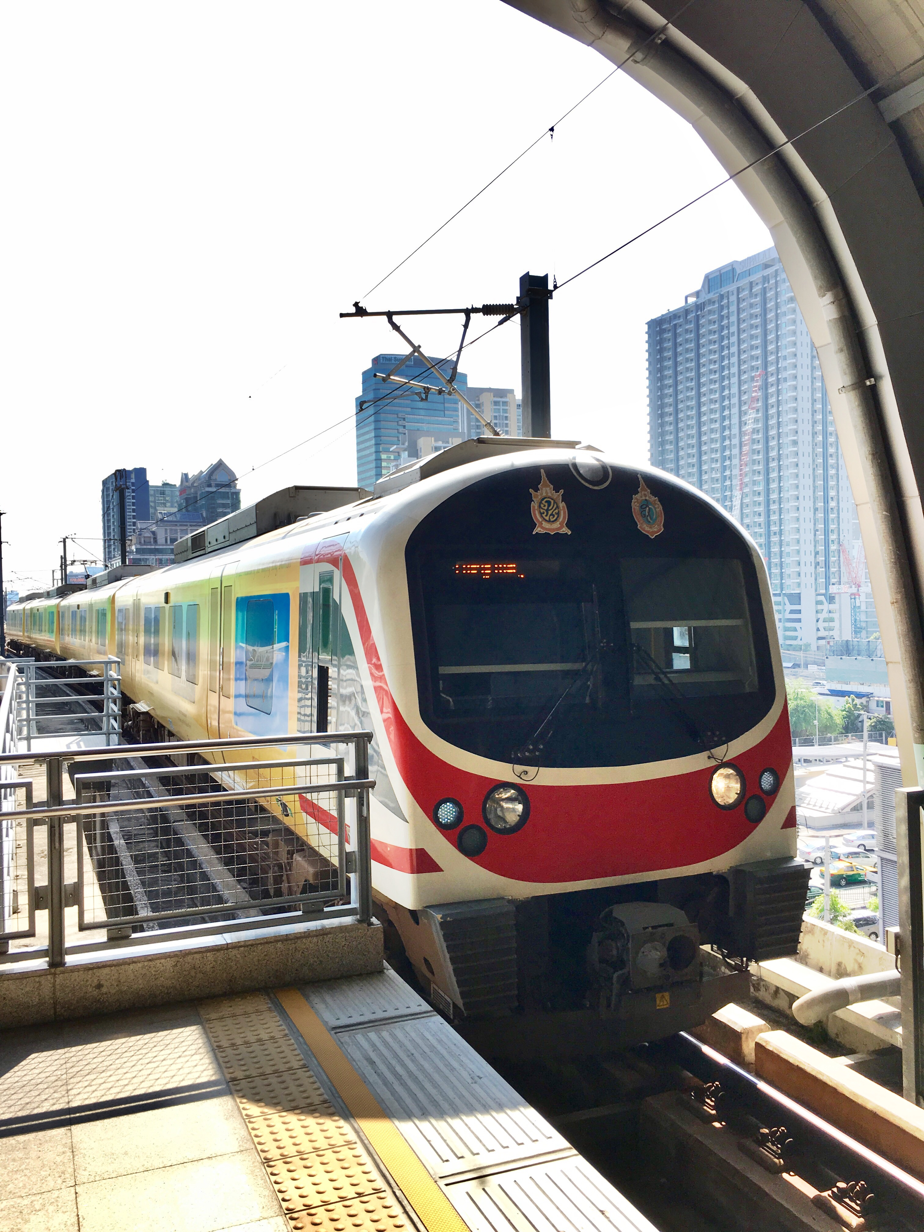 Bangkok Airport Rail Link